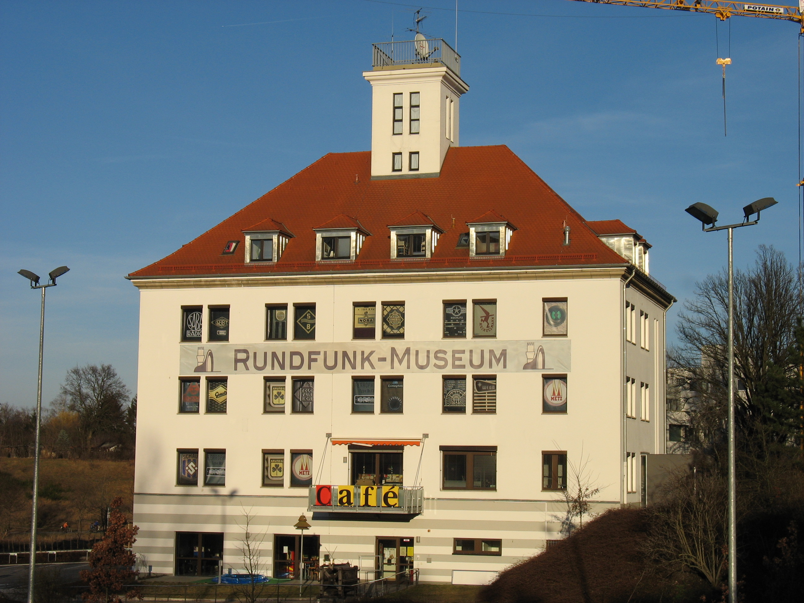 Ehemalige Grundig Direktion in Fürth (von 1949 bis 1969, heute Rundfunkmuseum der Stadt Fürth